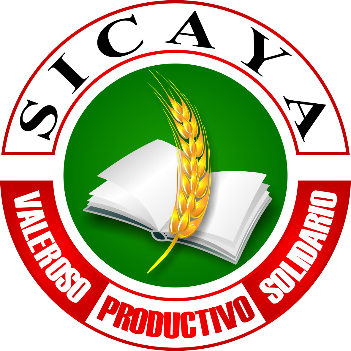 Distrito de Sicaya - Provincia de Huancayo - Región Junín